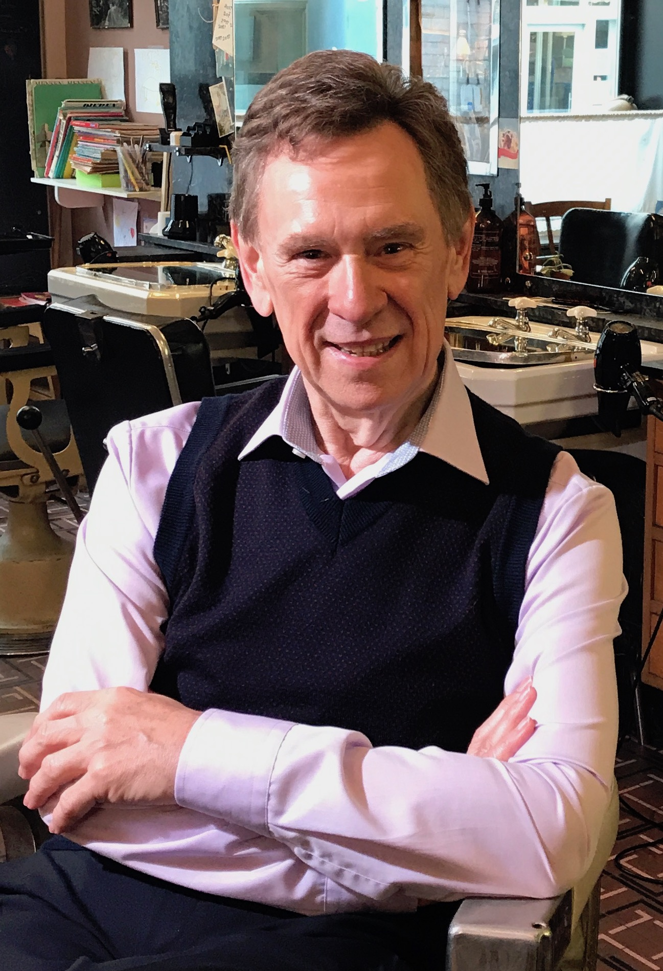 Koen Crucke